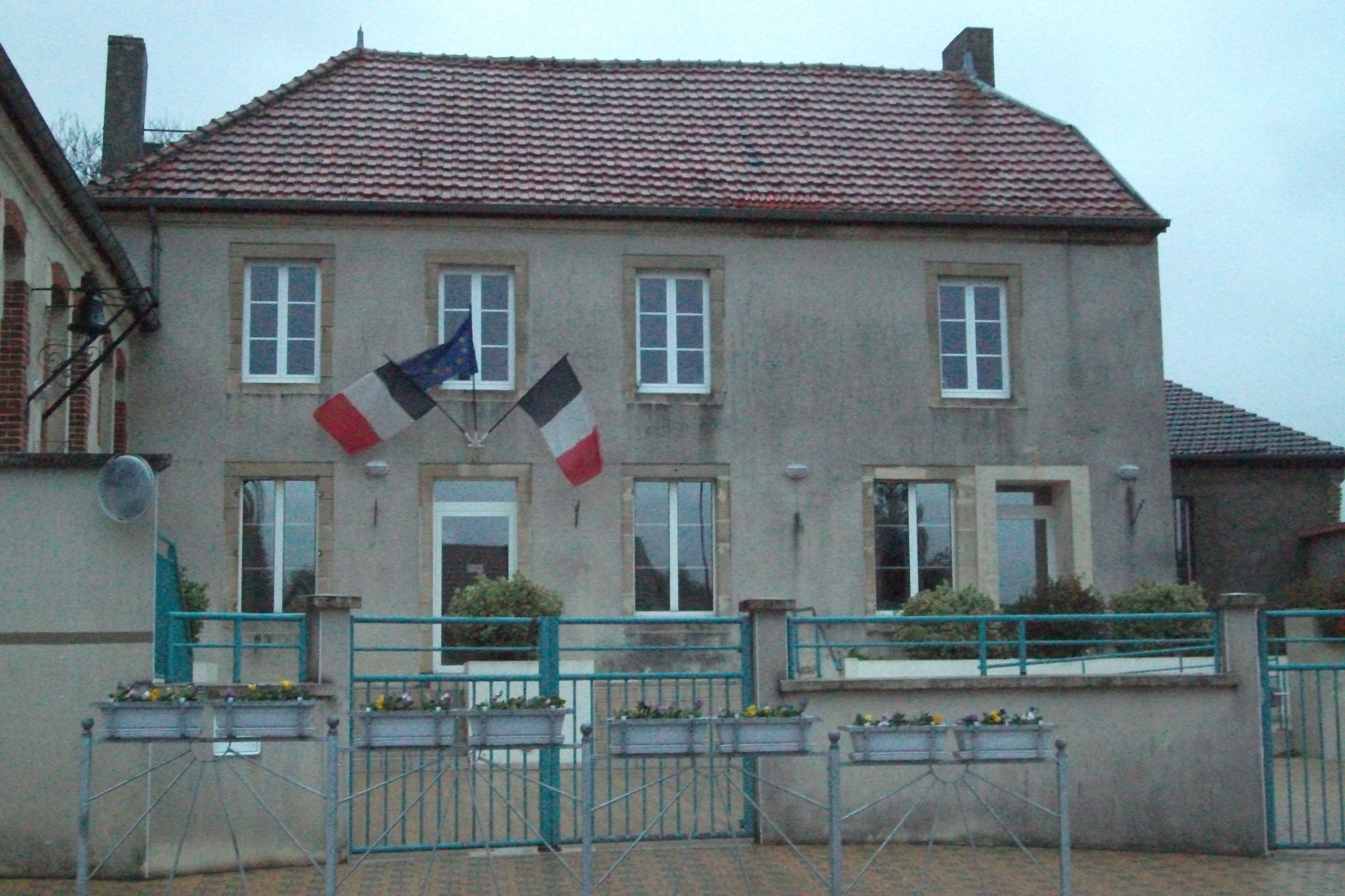 Mairie_de Savigny-sur-Ardres.